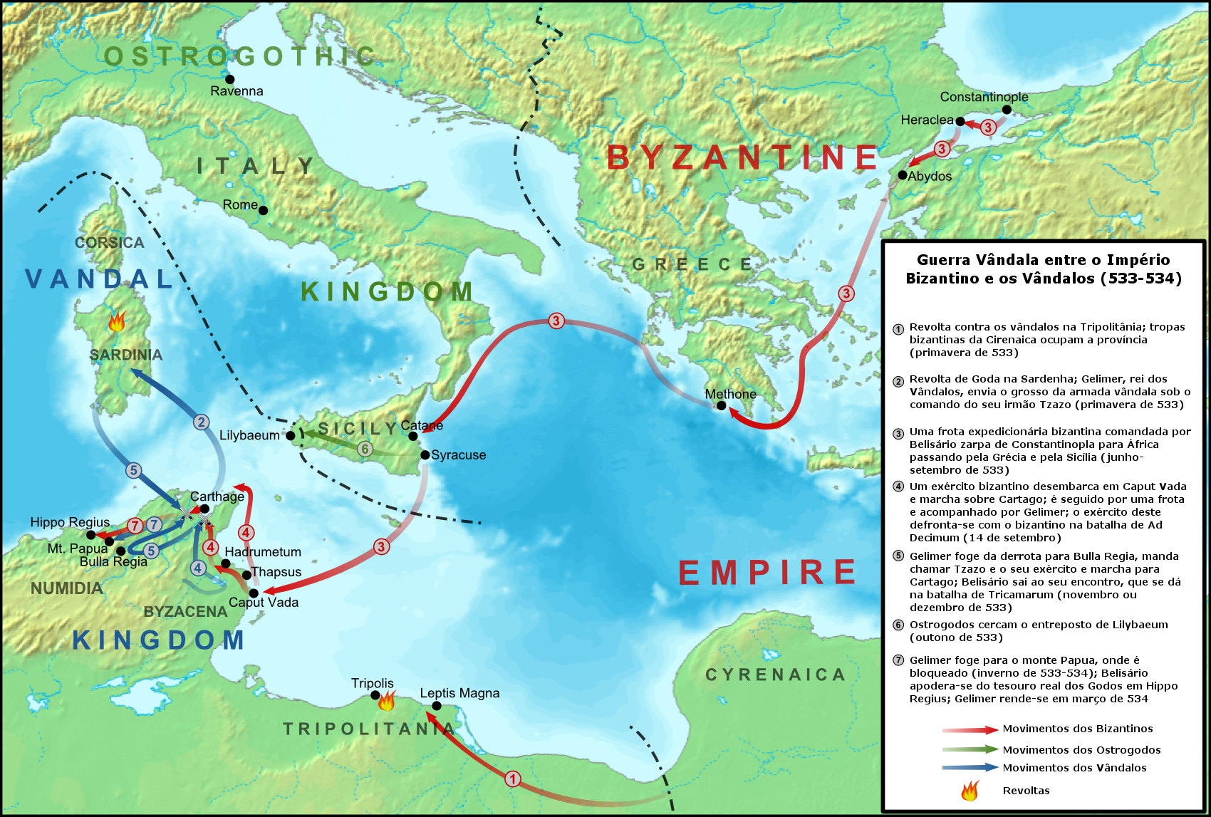 Mapa das operações da Guerra Vândala de 533-534, incluindo as revoltas na Tripolitânia e na Sardenha. Topografia retirada de DEMIS Mapserver, que está no domínio público. Fontes: Procópio de Cesareia, História das Guerras J. B. Bury, History of the Later Roman Empire James Allan Stewart Evans, The Age of Justinian: The Circumstances of Imperial Power, ISBN 9780415022095 Ian Hughes, Belisarius: The Last Roman General, ISBN 9781594160851